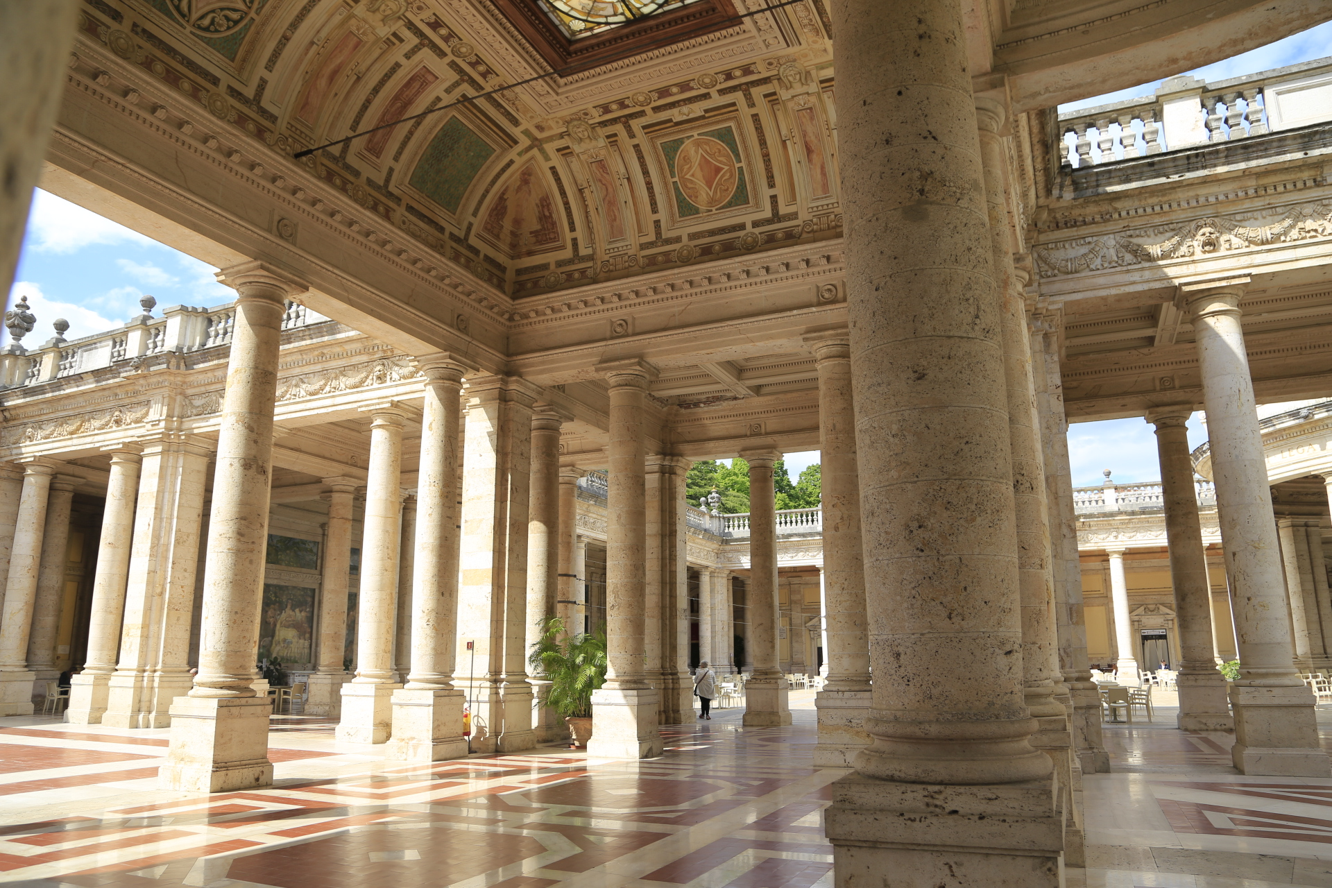 terme del tettuccio